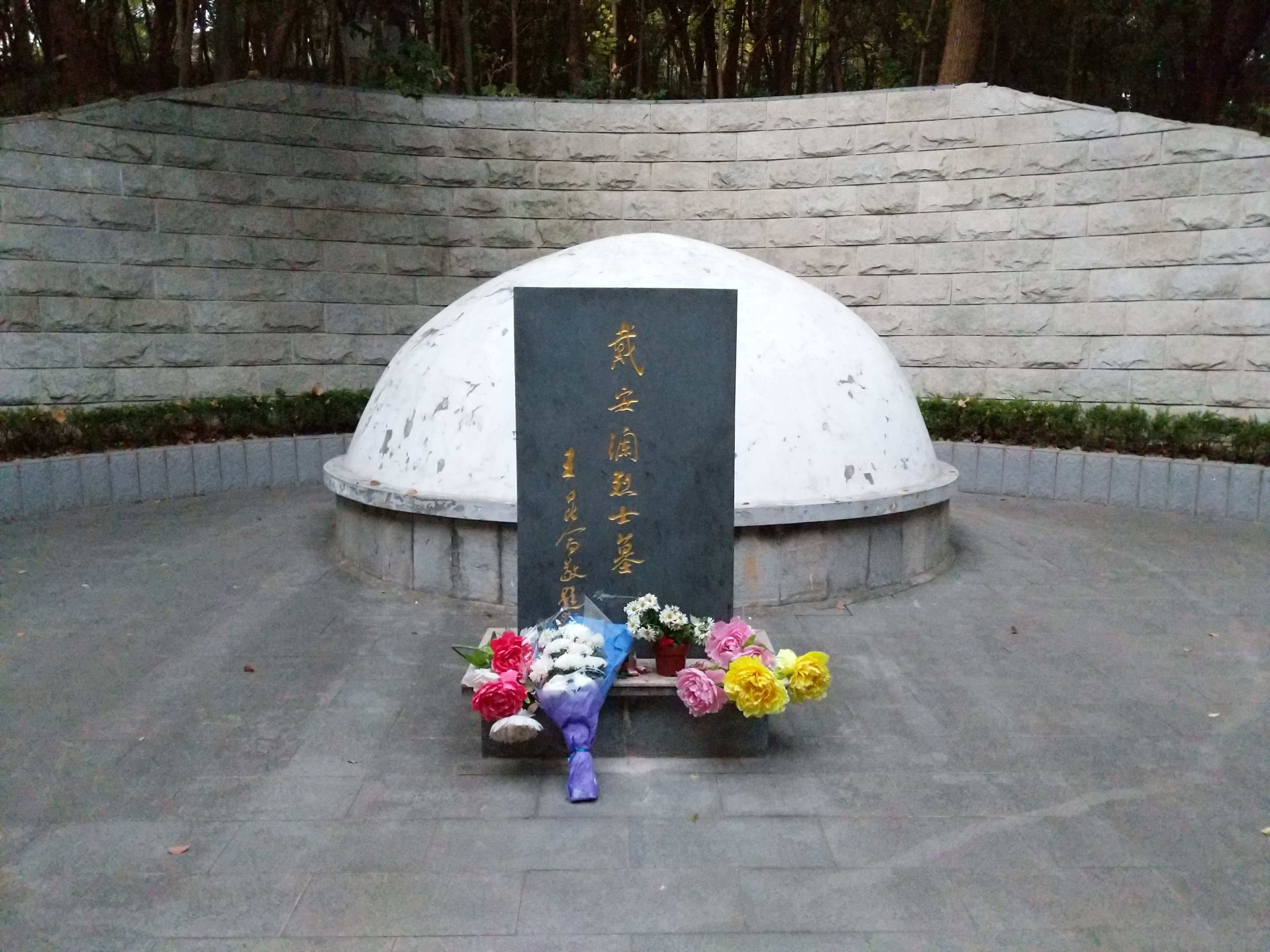 中文（中国大陆）: 戴安澜烈士墓